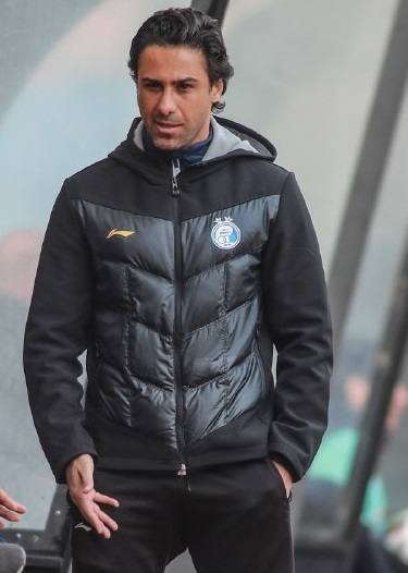 فرهاد مجیدی، مربی استقلال در بازی مقابل پیکان در زمستان ۹۷